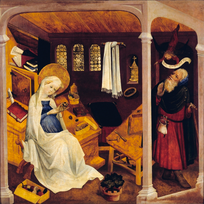 Le Doute de Joseph Maître du Jardin du Paradis (Paradiesgärtlein), v. 1430. Sapin, 113,9 x 114,5 cm. Strasbourg, musée de l’Œuvre Notre-Dame